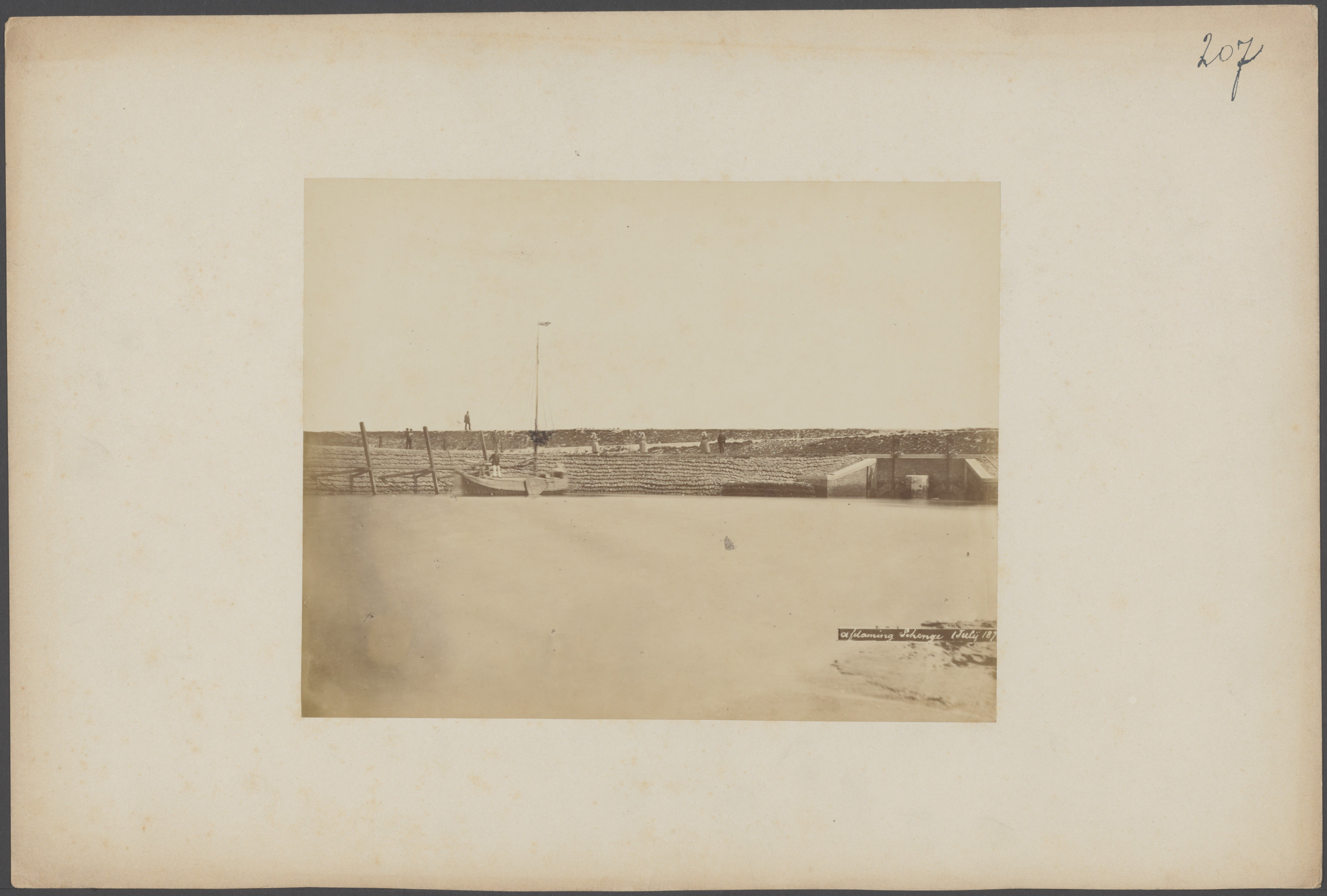 Collectie / archief : Fotocollectie Rijkswaterstaat : Metadata : Collectie / Archief : Fotocollectie Rijkswaterstaat Reportage / Serie : Werken in Zeeland Beschrijving : Afdamming in de Schenge Datum : juli 1874 Locatie : Zeeland, Zeeland, Zuid-Beveland, Zuid-Beveland Trefwoorden : afdammingen, inpolderingen, waterbouw Fotograaf : Bauer, Carl Wilhelm Auteursrechthebbende : Public Domain logo Materiaalsoort : Foto (zwart/wit) Nummer archiefinventaris : bekijk toegang 2.24.11 Inventarisnummer : 13 Bestanddeelnummer : 108